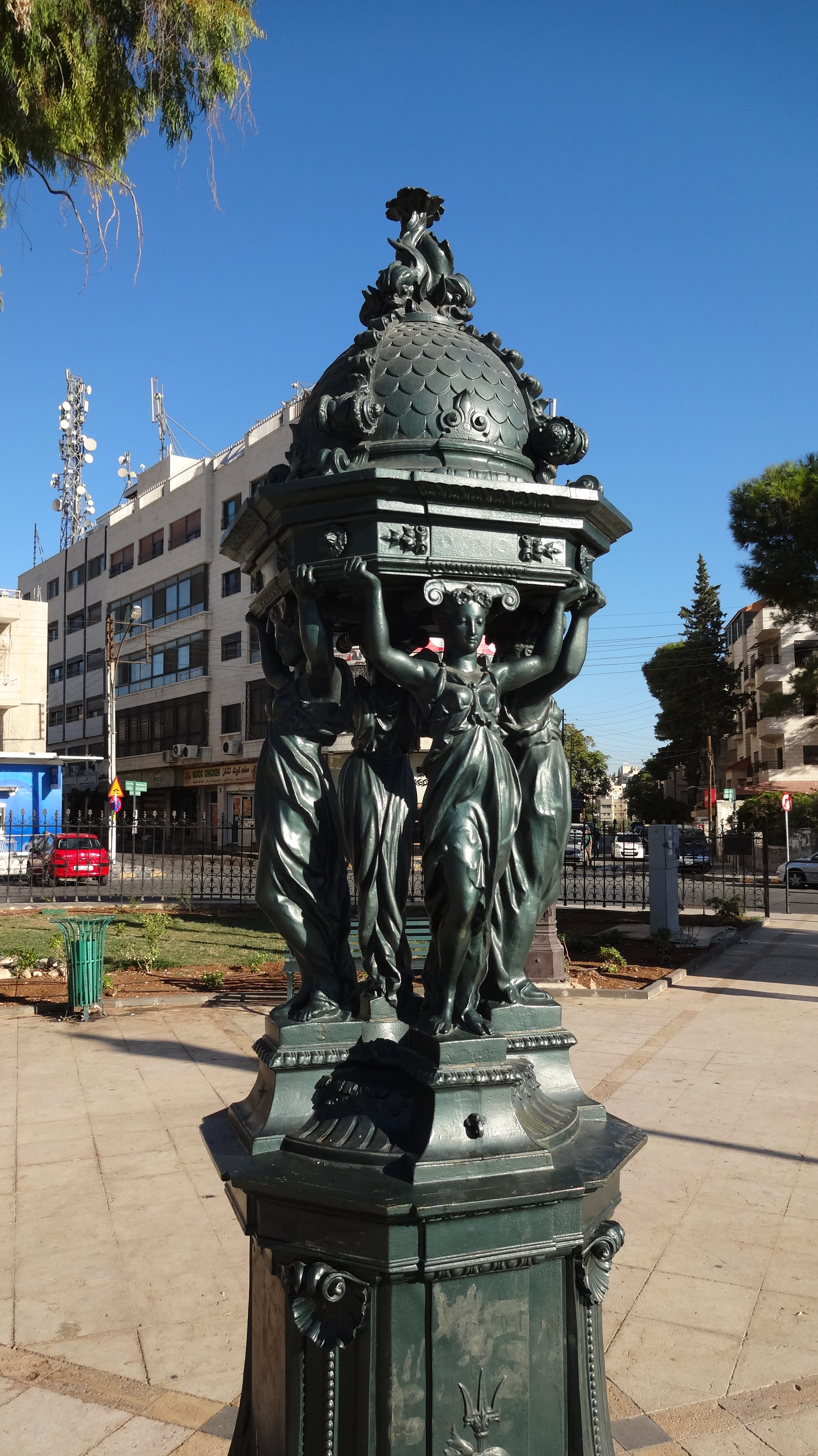 كان يطلق عليه "ميدان الأمعري" وفي العام 1969 عملت الجهات المسؤولة، على هدمه وإزالته، وأطلقت عليه "ميدان محمد علي العجلوني" القائد العسكري المعروف. ثم أصبح دوار باريس أطلق عليه هذا الاسم في العام 2005، بقرار من أمانة عمان الكبرى .وجاء ذلك في إطار التعاون بين بلديتي عمان وباريس، اللتين تربطهما اتفاقية صداقة وتعاون، وجرى اختيار هذا الموقع؛ لقربه من المركز الثقافي الفرنسي. مساحة"دوار باريس" تصل الى 1.25 دونم